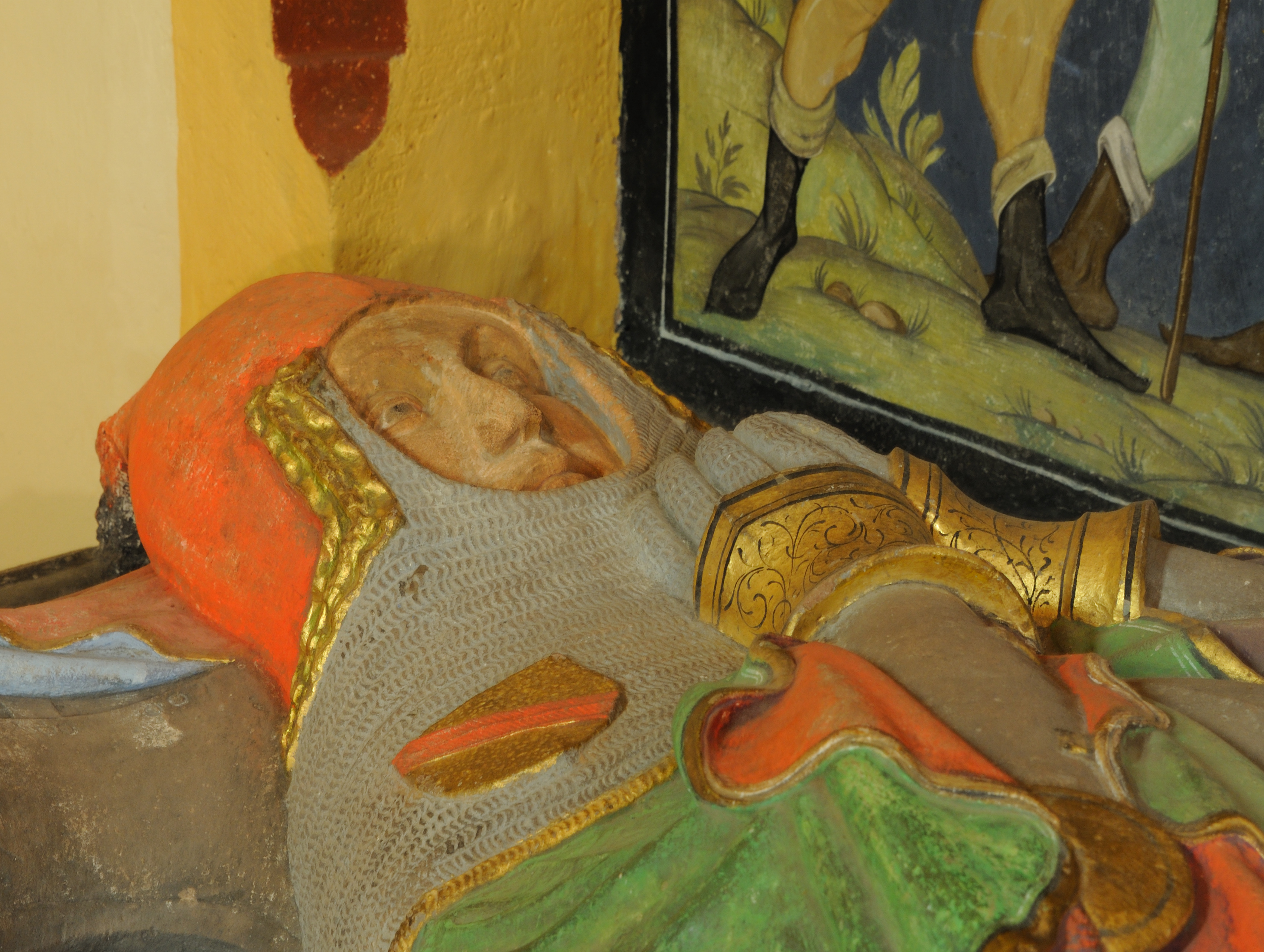 Lörrach: Galluskirche (Grabplatte von Rudolf III. von Hachberg-Sausenberg)